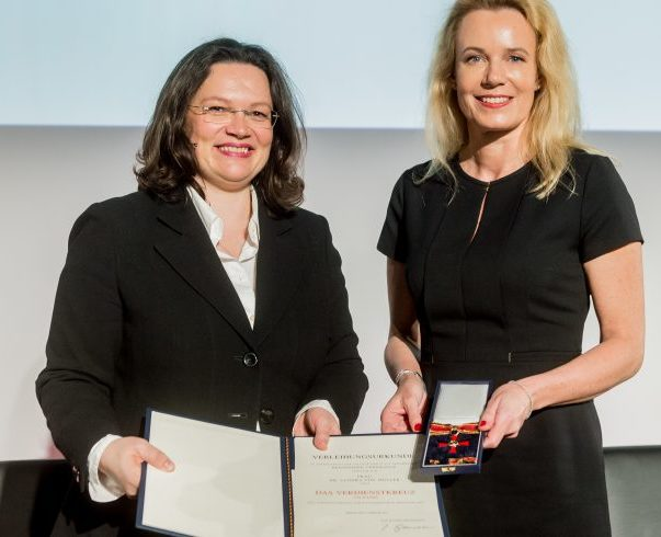 Dr. Sandra von Möller bei der Verleihung des Bundesverdienstkreuzes